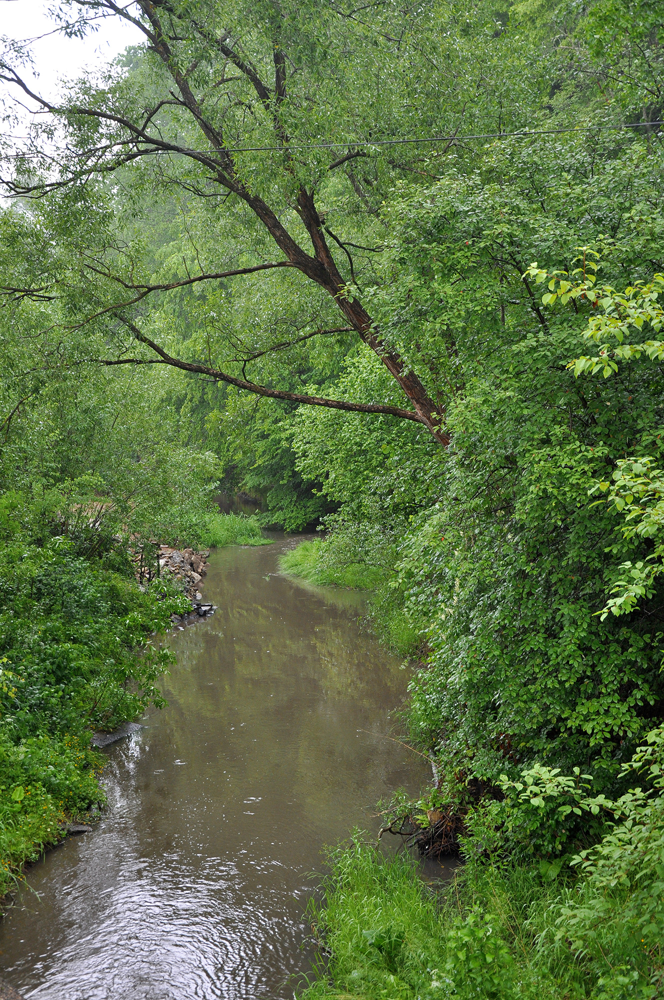 Річка Бережниця біля Моршина.